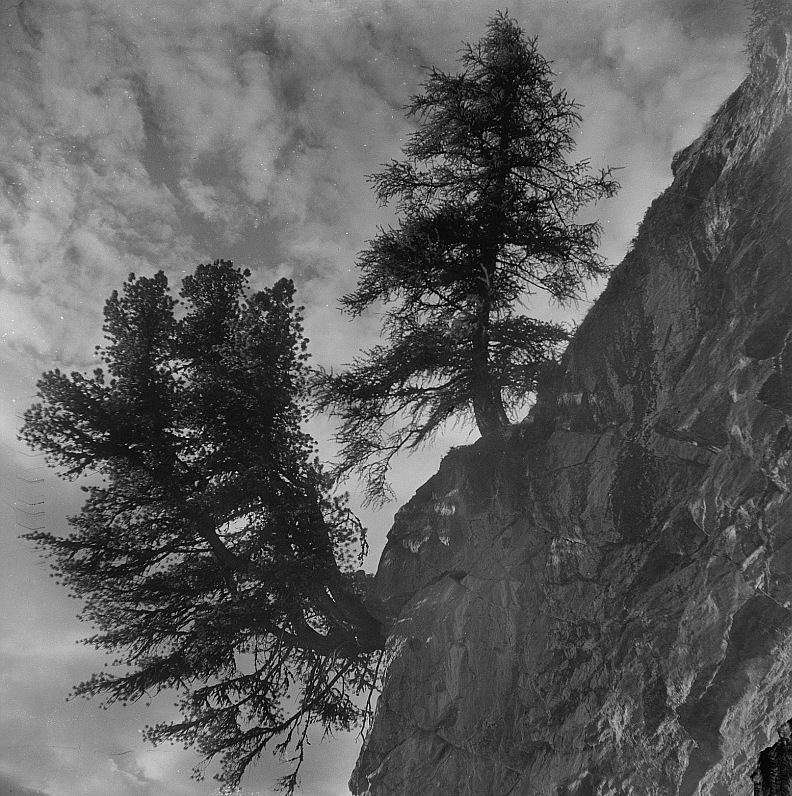 Original image description from the Deutsche Fotothek Zirbelkiefer und Lärche im Allgäu